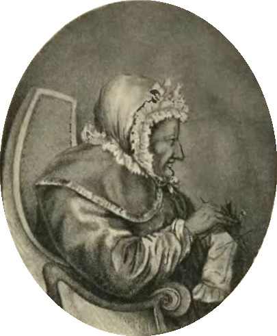 Marianna Lanckorońska ze Świdzińskich